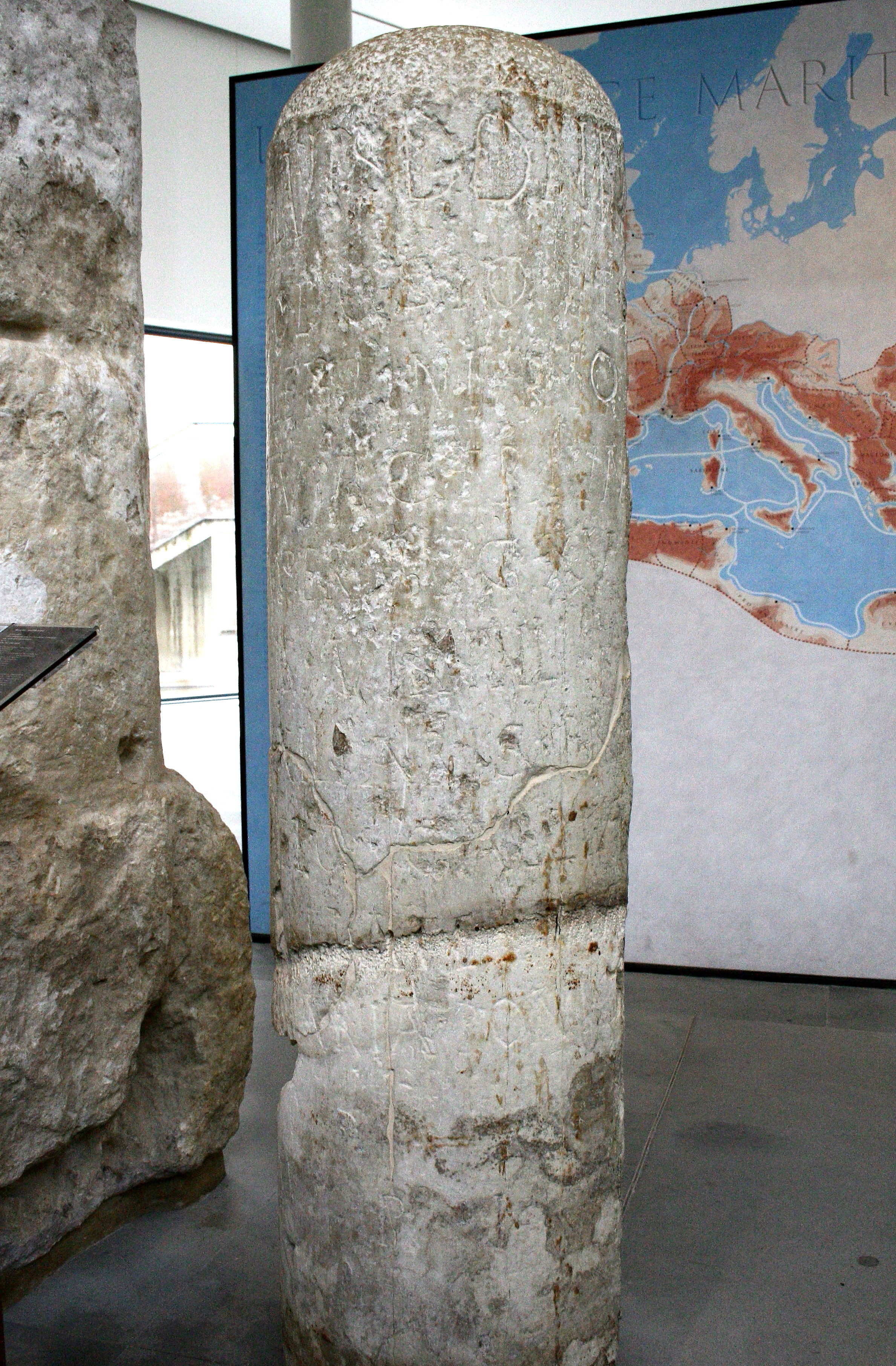 Borne milliaire découverte à Arles en 1573 dans l'hôtel de Laval-Castellane. Dernière borne connue en Gaule Narbonnaise (début du Ve siècle). Voie aurélienne, premier mille. Conservée au Musée de l'Arles antique